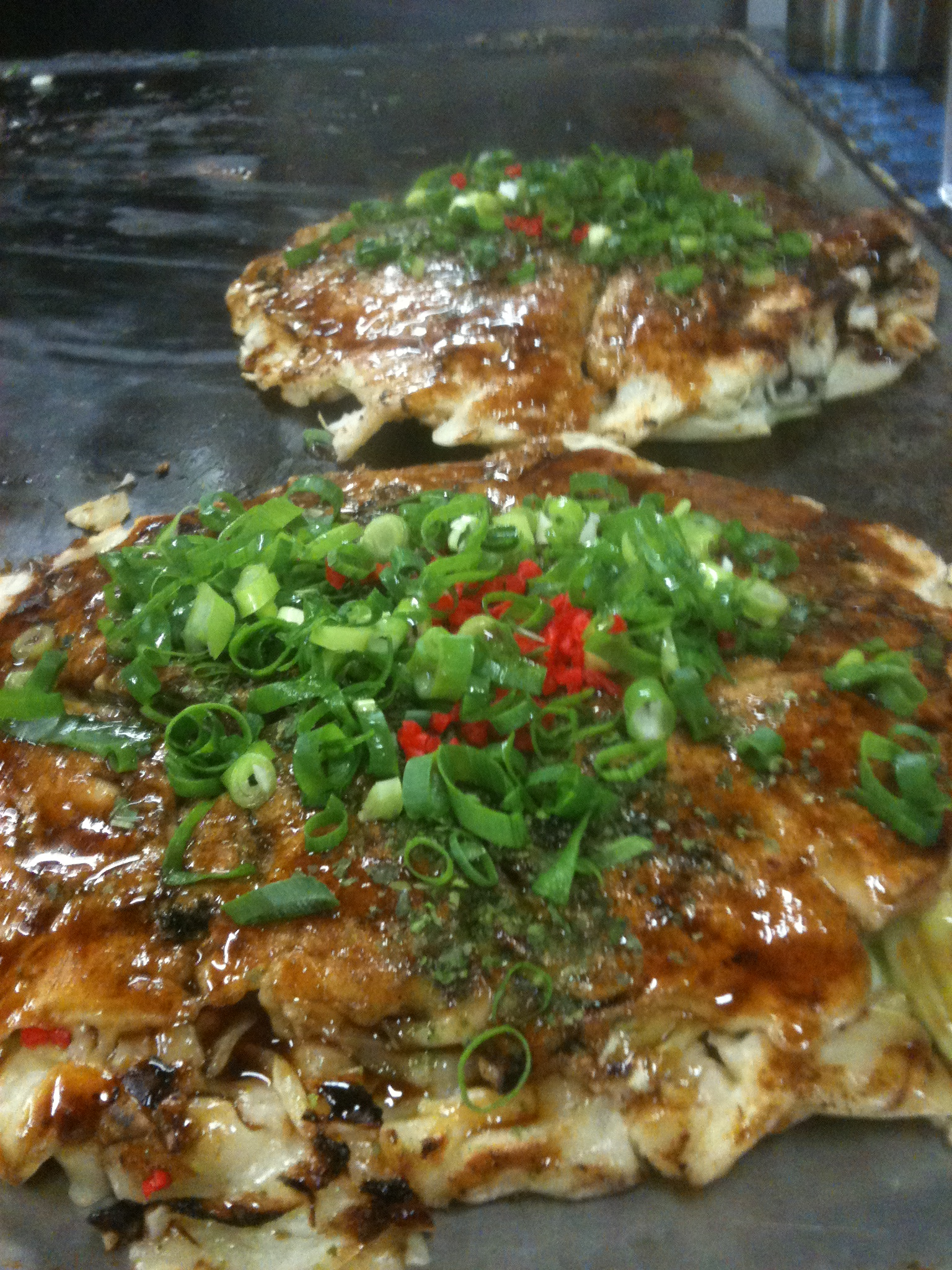 日生のカキオコ